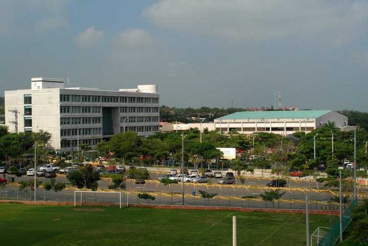 Cancha de Futbol y Edificio de Postgrados, Alvaro Jaramillo Vengoechea.